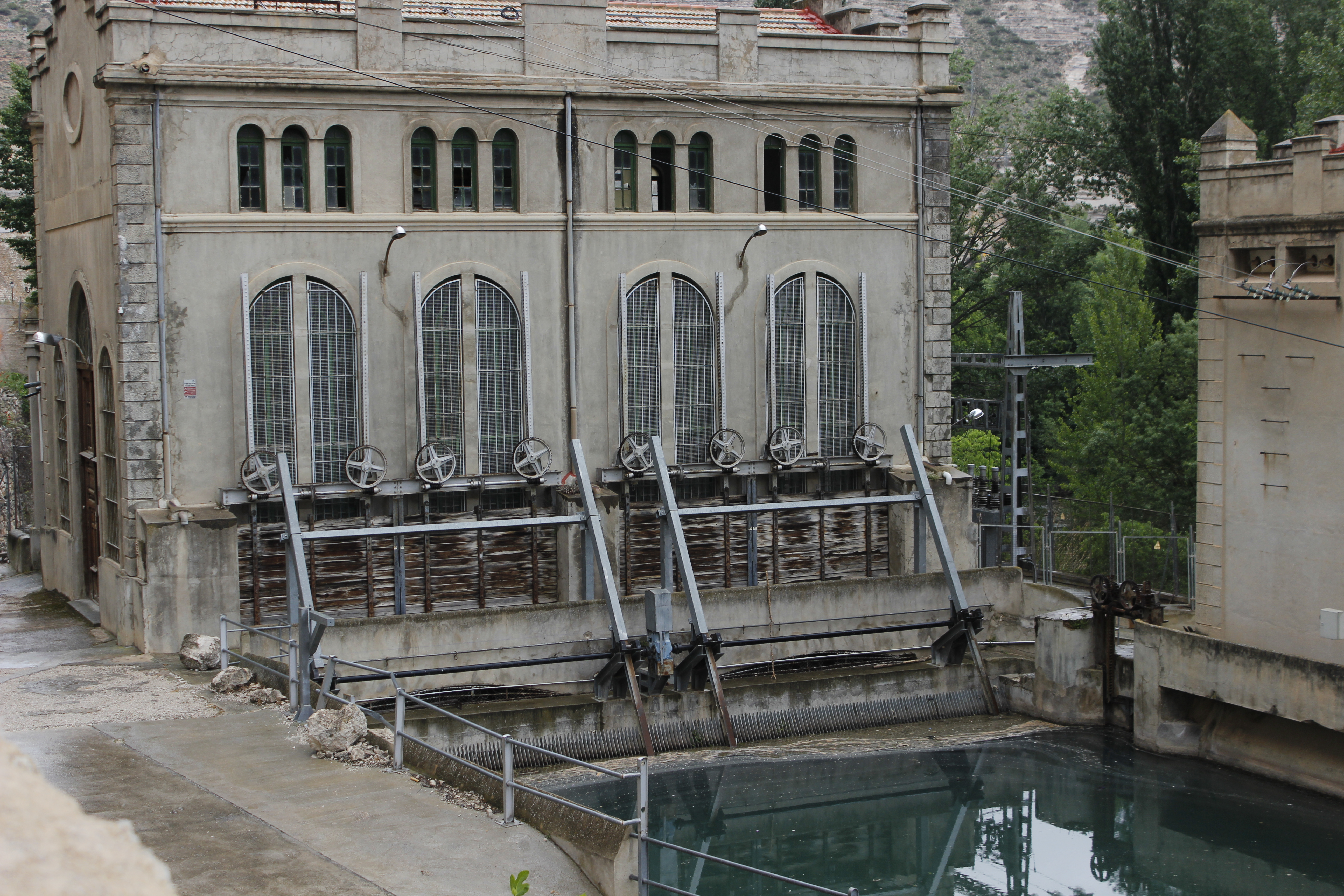 Pendiente